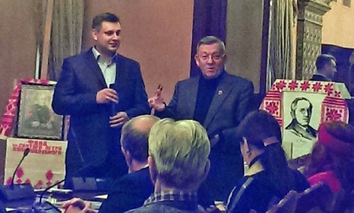 Степан Дупляк (премія Олеся)